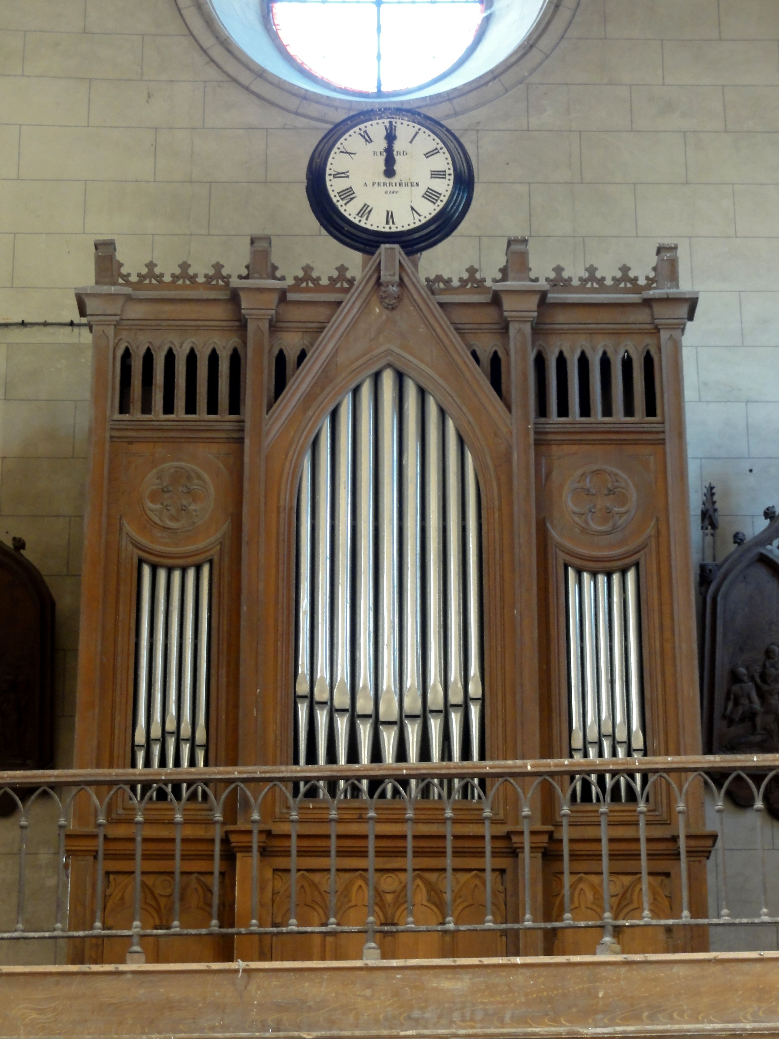 Orgue de tribune d'Antoine Sauvage (facteur d'orgues à Metz, ancien ouvrier chez Cavaillé-Coll et Daublaine & Callinet), construit en 1857 comme orgue de chœur de l'église St Jacques à Compiègne, transféré en 1876; 5 jeux sur un seul clavier et pédalier à l'allemande en tirasse.